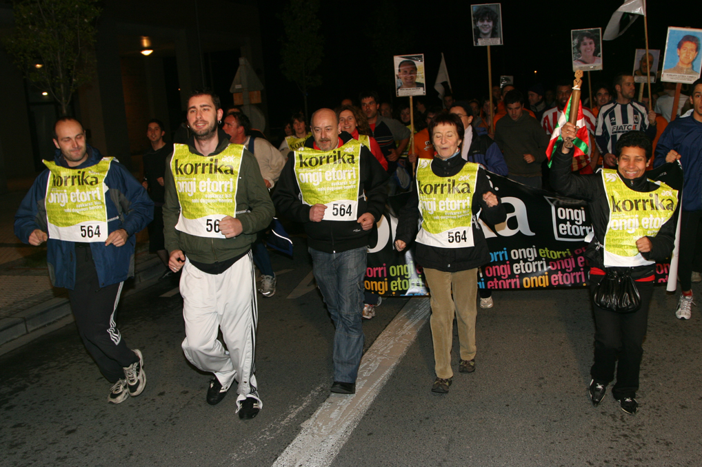 Colección AMARAuna Bilduma 2009 Er. 329 Iturria / Fuente: Mertxe Mardaras Informazio gehiago / Más información: Amarako Ernest Lluch Kultur Etxeko Liburutegia / Biblioteca del Centro Cultural Ernest Lluch de Amara (Donostia-San Sebastián). Korrika, popular relay race in support of the Basque language across Donostia-San Sebastián